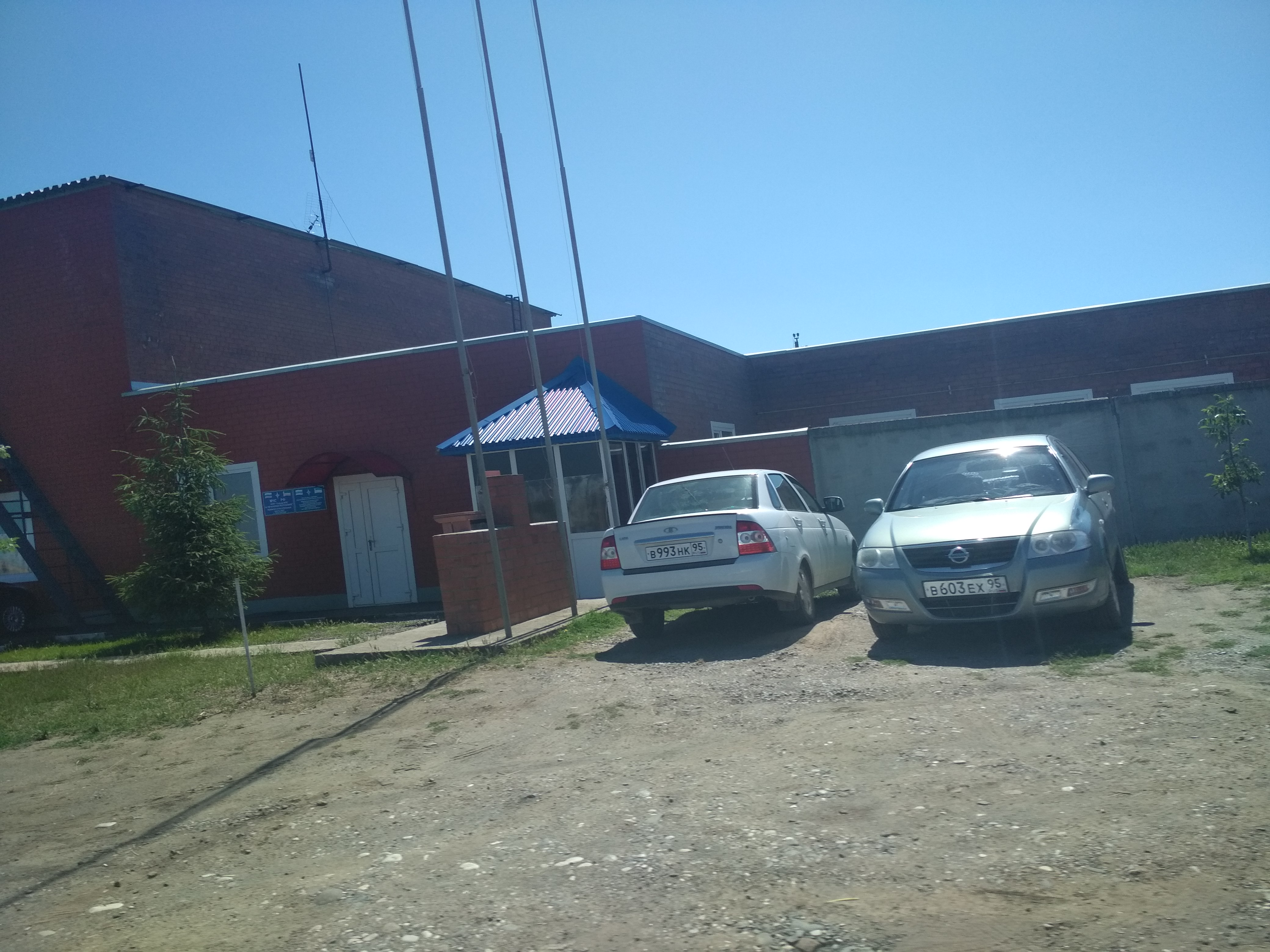 Нохчийн: Горагорскера цӀе йойачеран дакъа